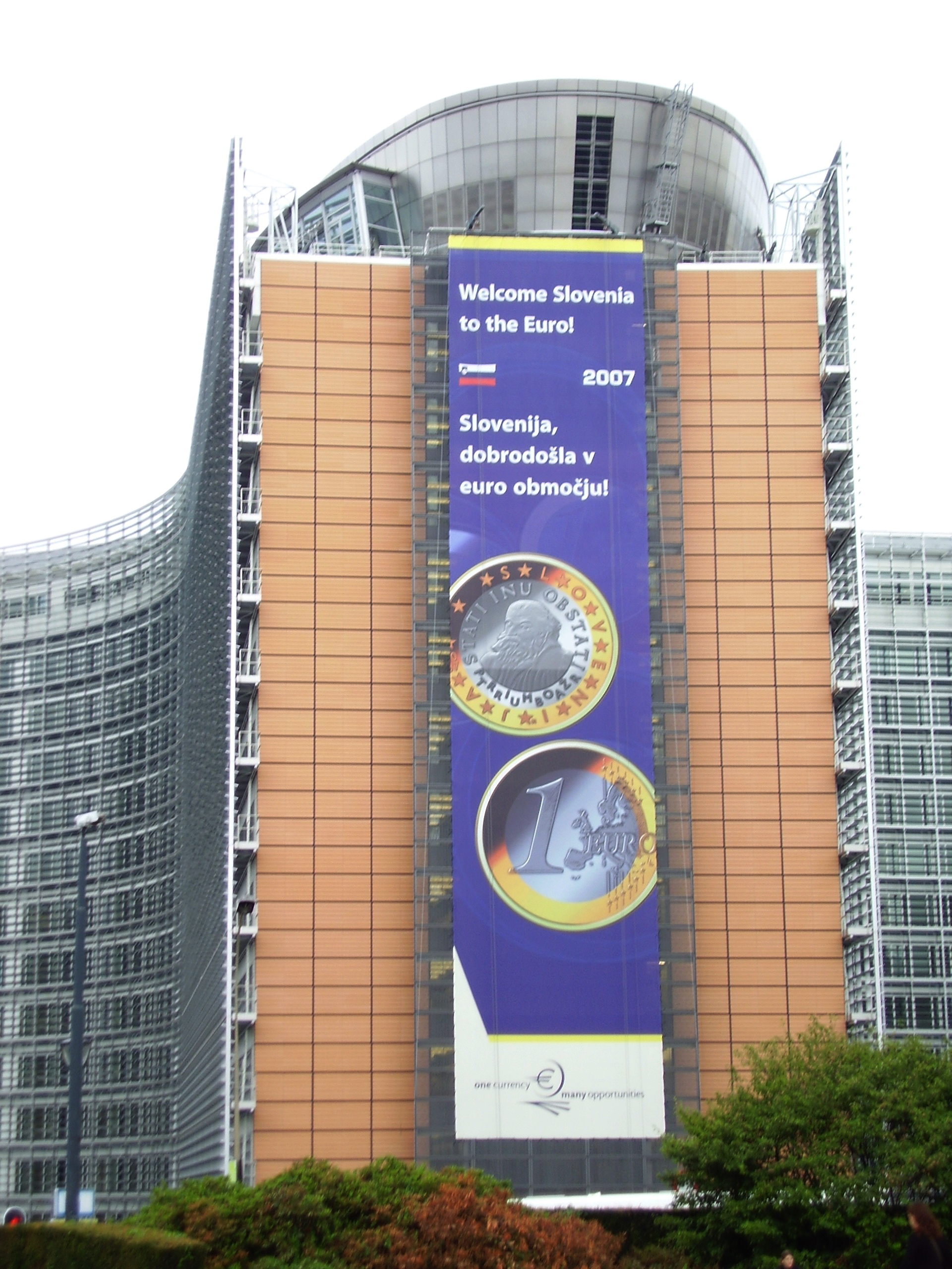 Berlaymont, siège de la Commission européenne à Bruxelles